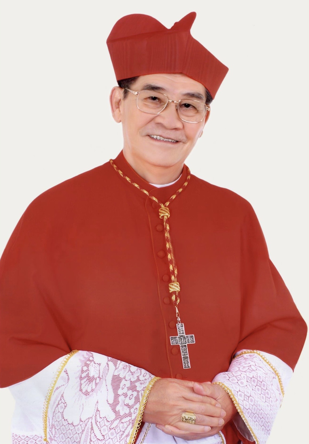 Chân dung Đức Hồng Y Gioan Baotixita Phạm Minh Mẫn, Nguyên Tổng Giám mục Tổng Giáo Phận Sài Gòn.